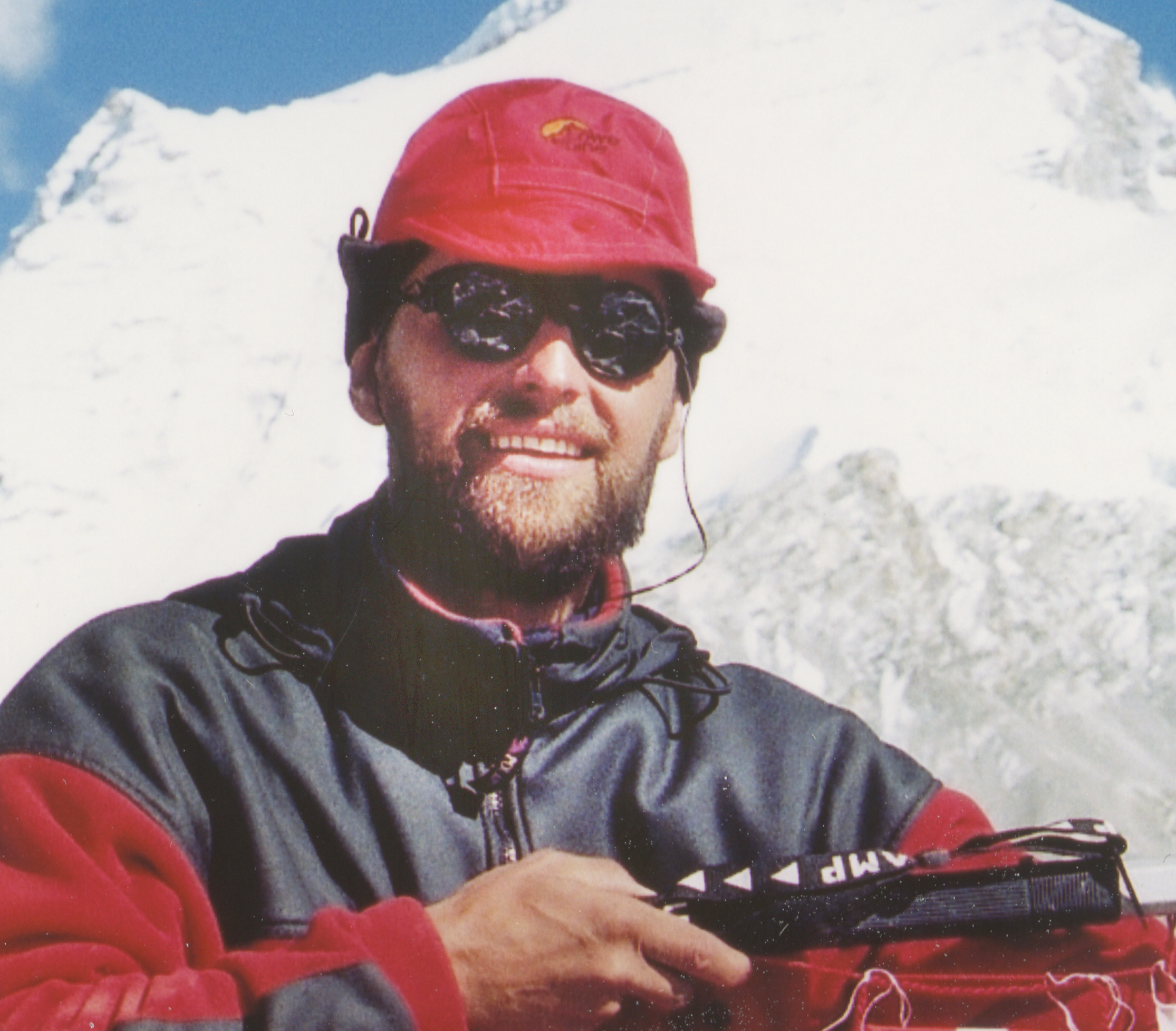 Margus Proos